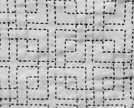 ゆかた